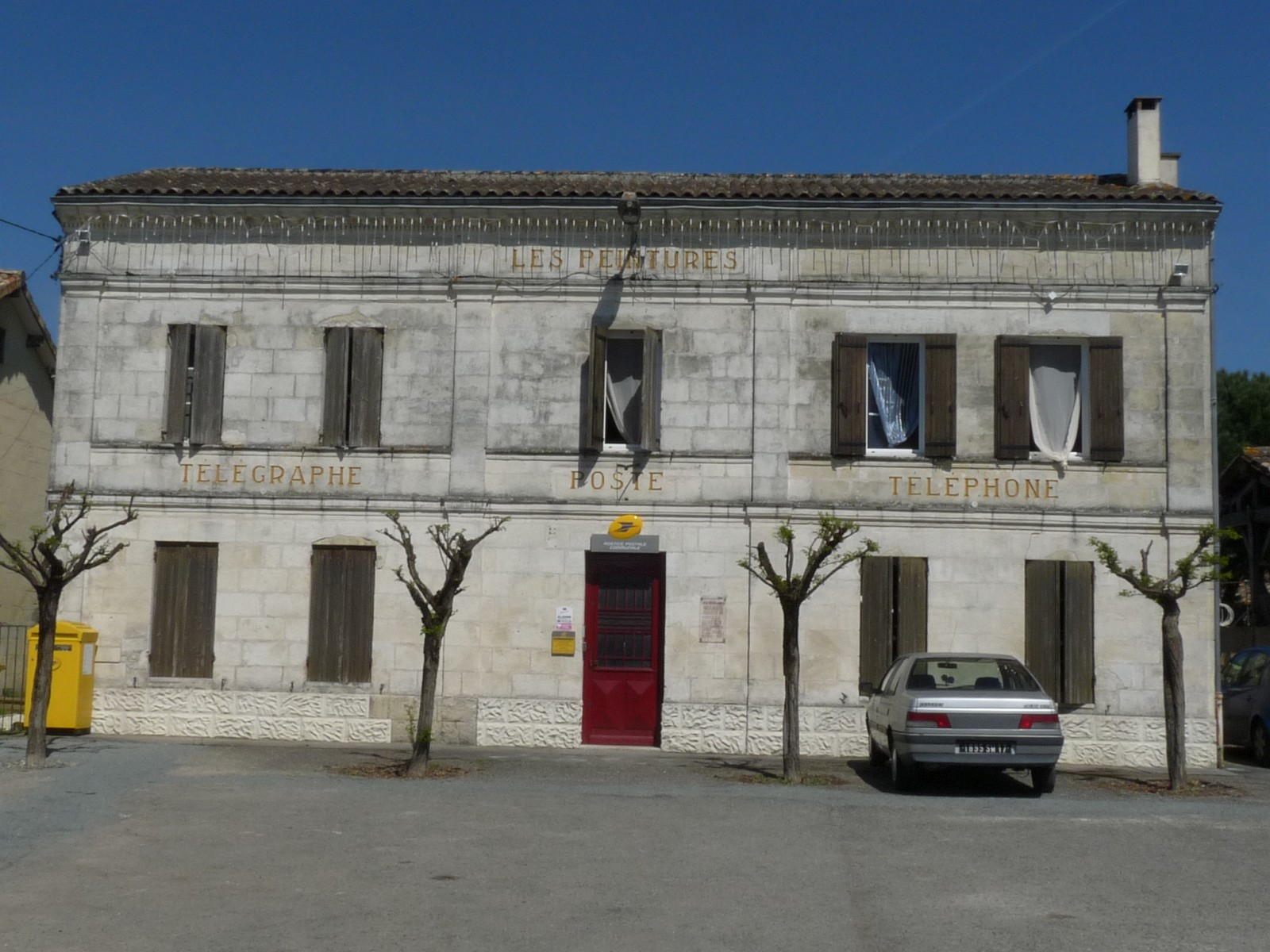 Poste, Les Peintures, Gironde, France